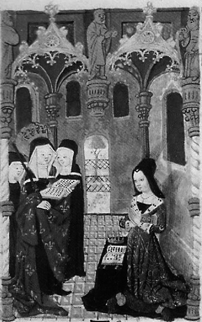 Charlotte von Savoyen auf einer mittelalterlichen Miniatur